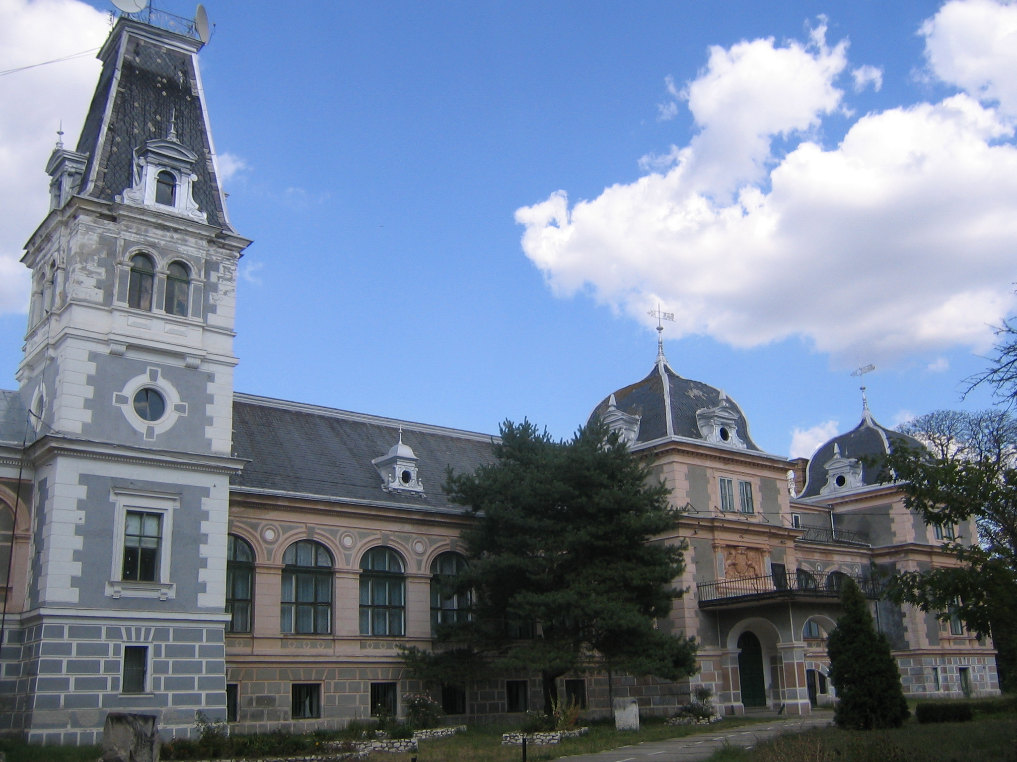 Castelul de la Macea, jud Arad